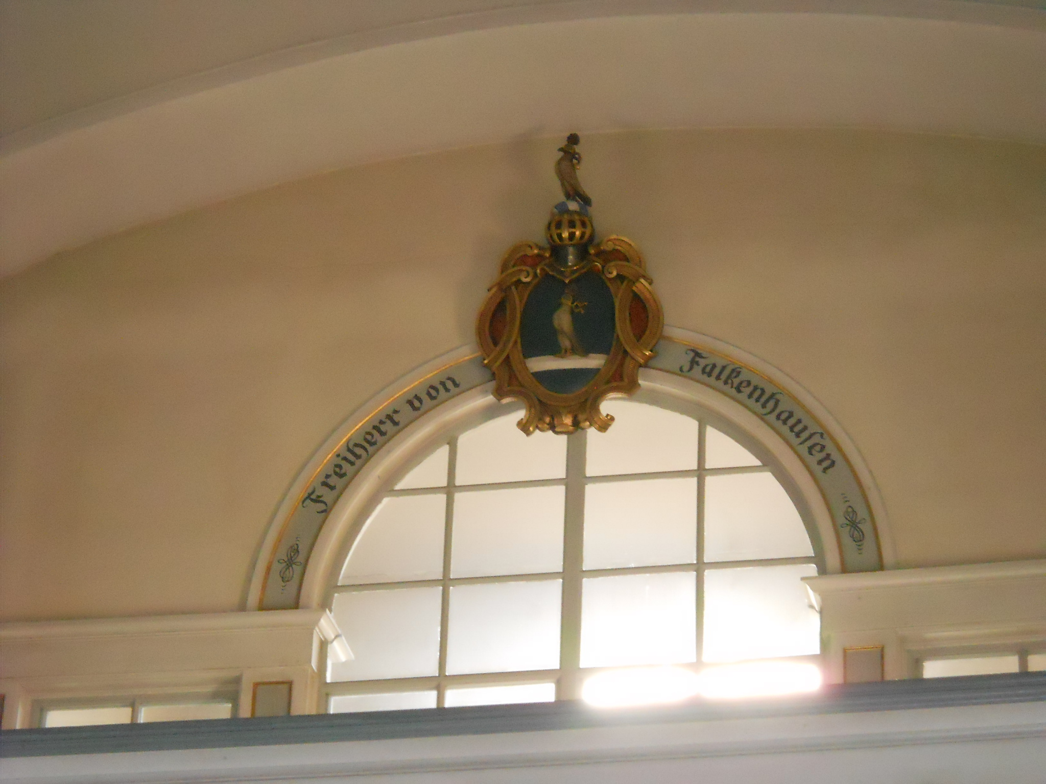 Falkenhausen-Wappen in der Kirche von Wald, Ortsteil von Gunzenhausen im Landkreis Weißenburg-Gunzenhausen (Bayern)